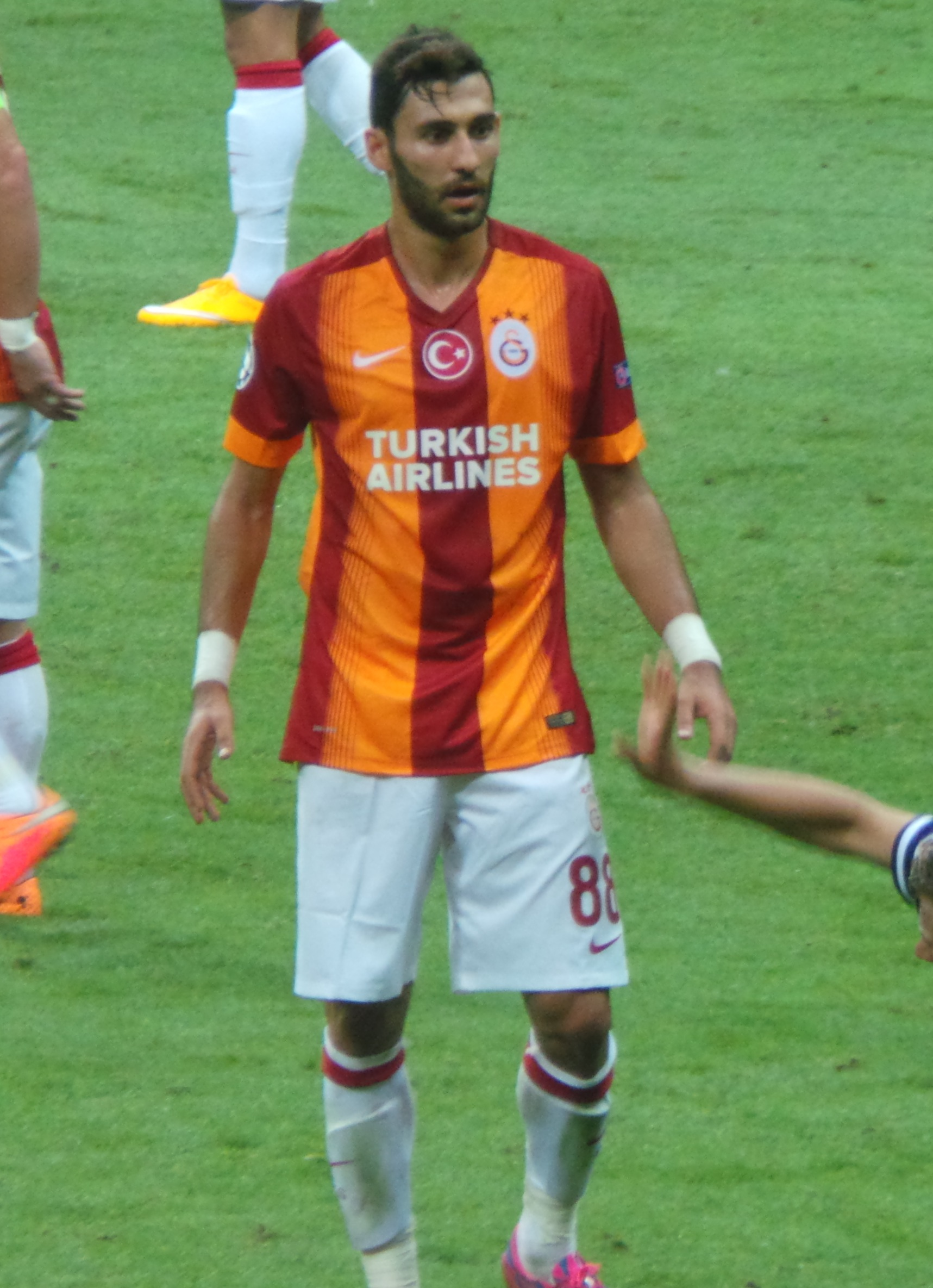 Veysel Sarı